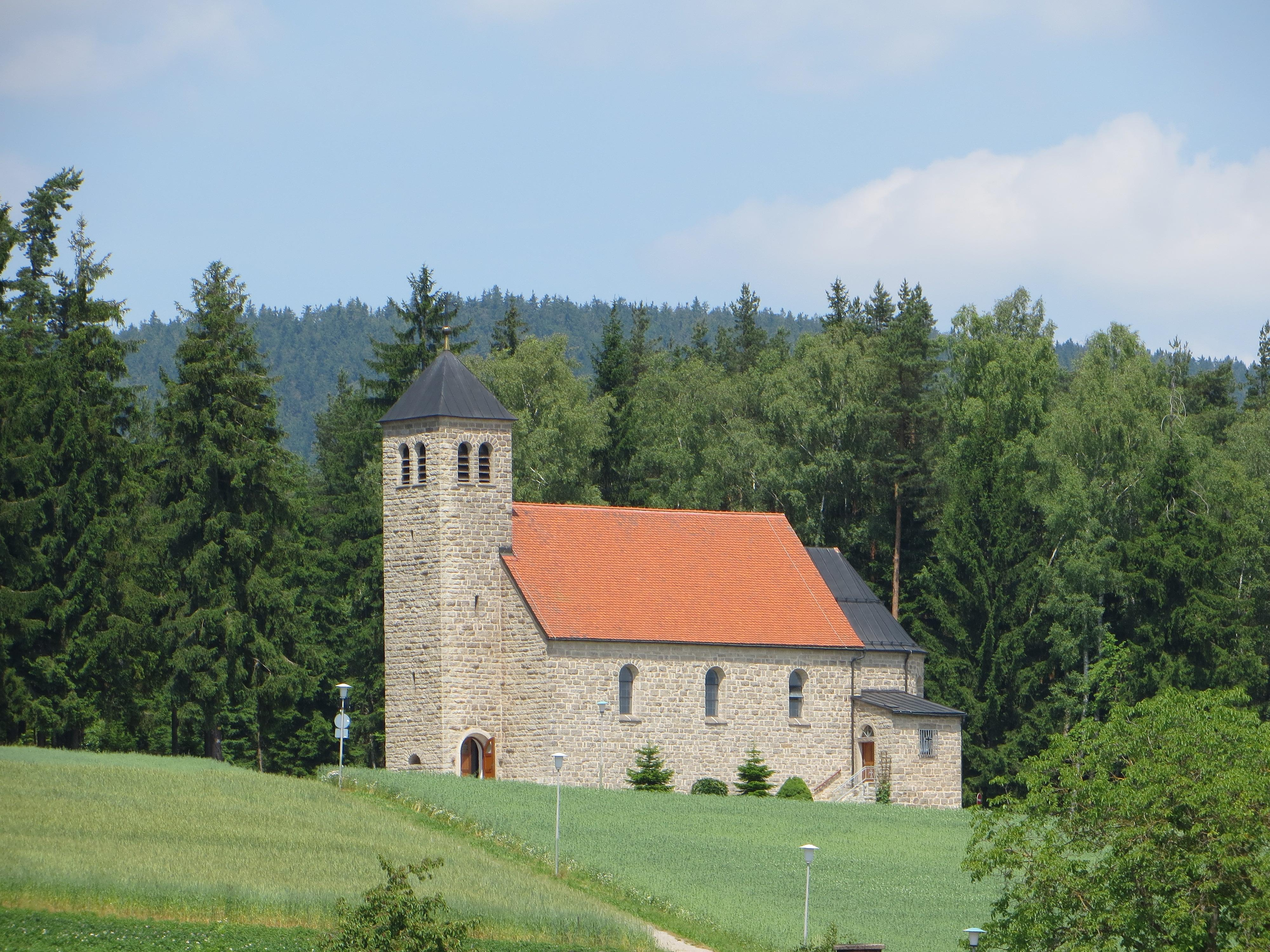 Steinwaldkirche St.Peter in Wäldern bei Erbendorf